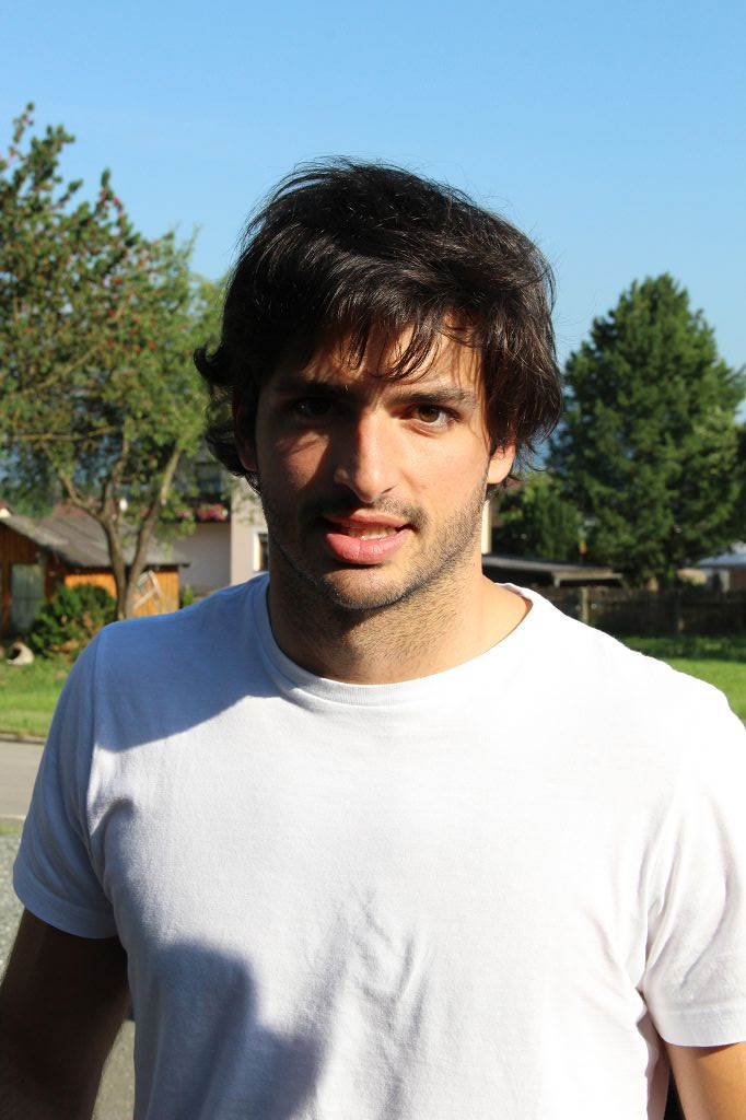 Formula 1 2019 / Schloss Gabelhofen